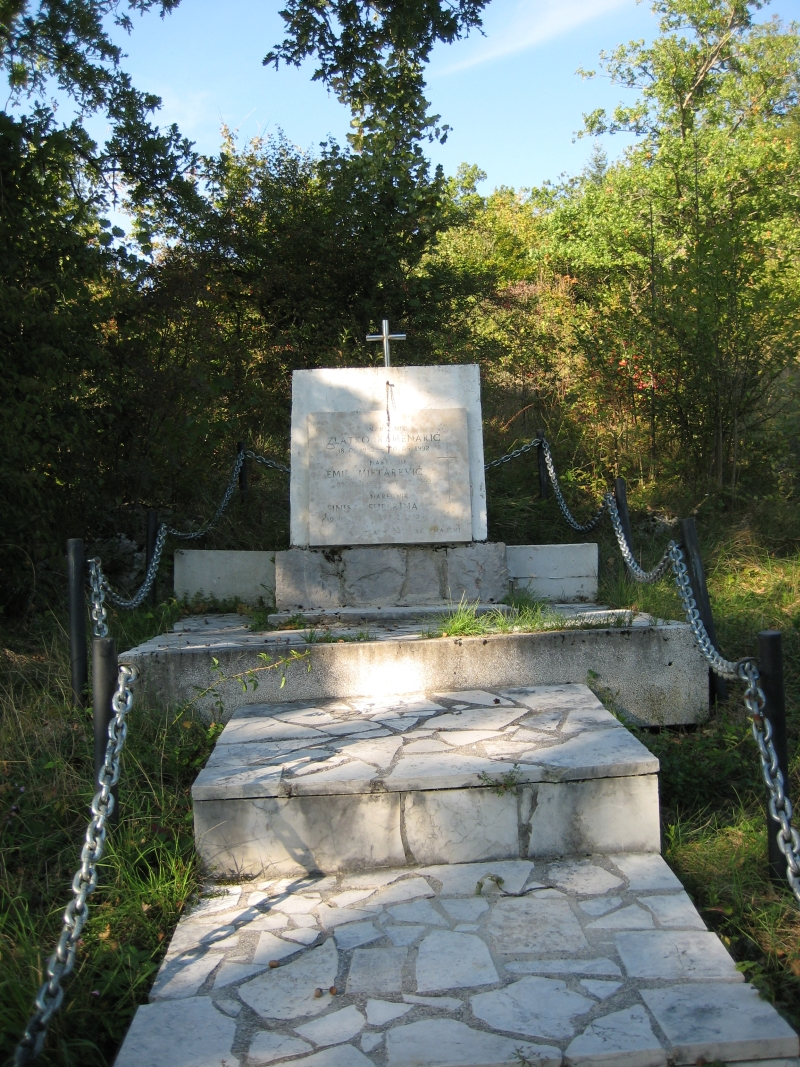 Spomenik poginulim pripadnicima 111. brigade, brinjsko područje, Croatia